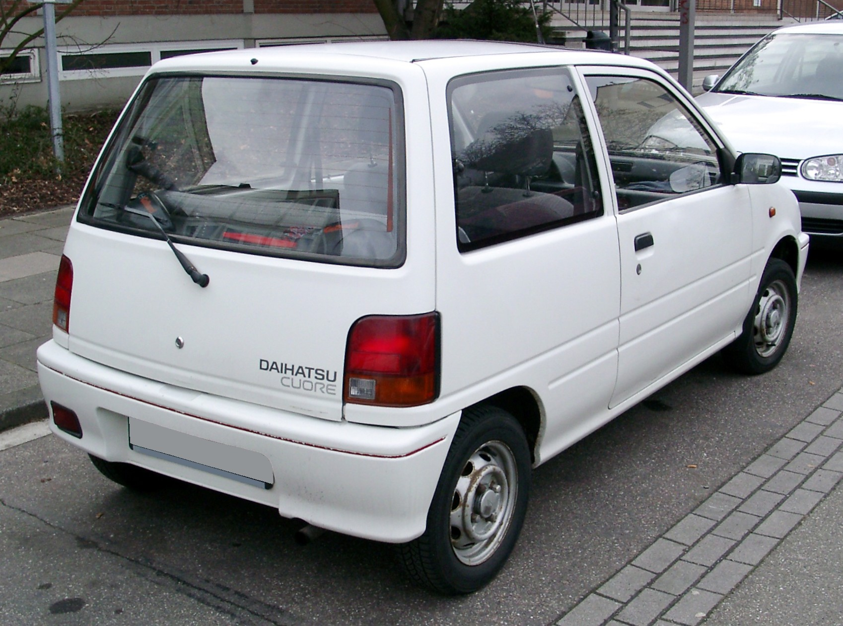 Daihatsu Cuore